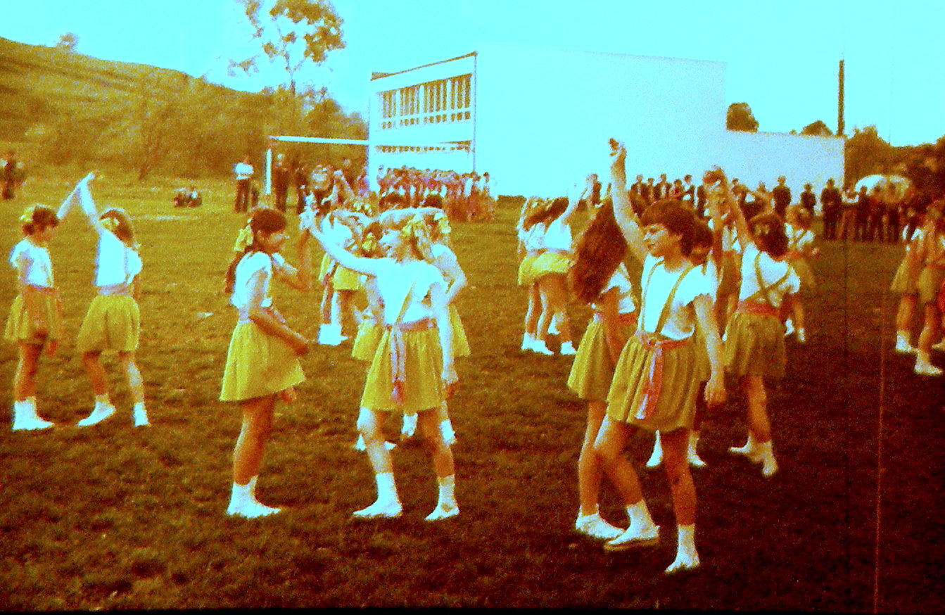 Miestne kolo československej spartakiády v obci Sedlice, okres Prešov, ktoré zorganizovala Základná deväťročná škola. 19. máj 1985